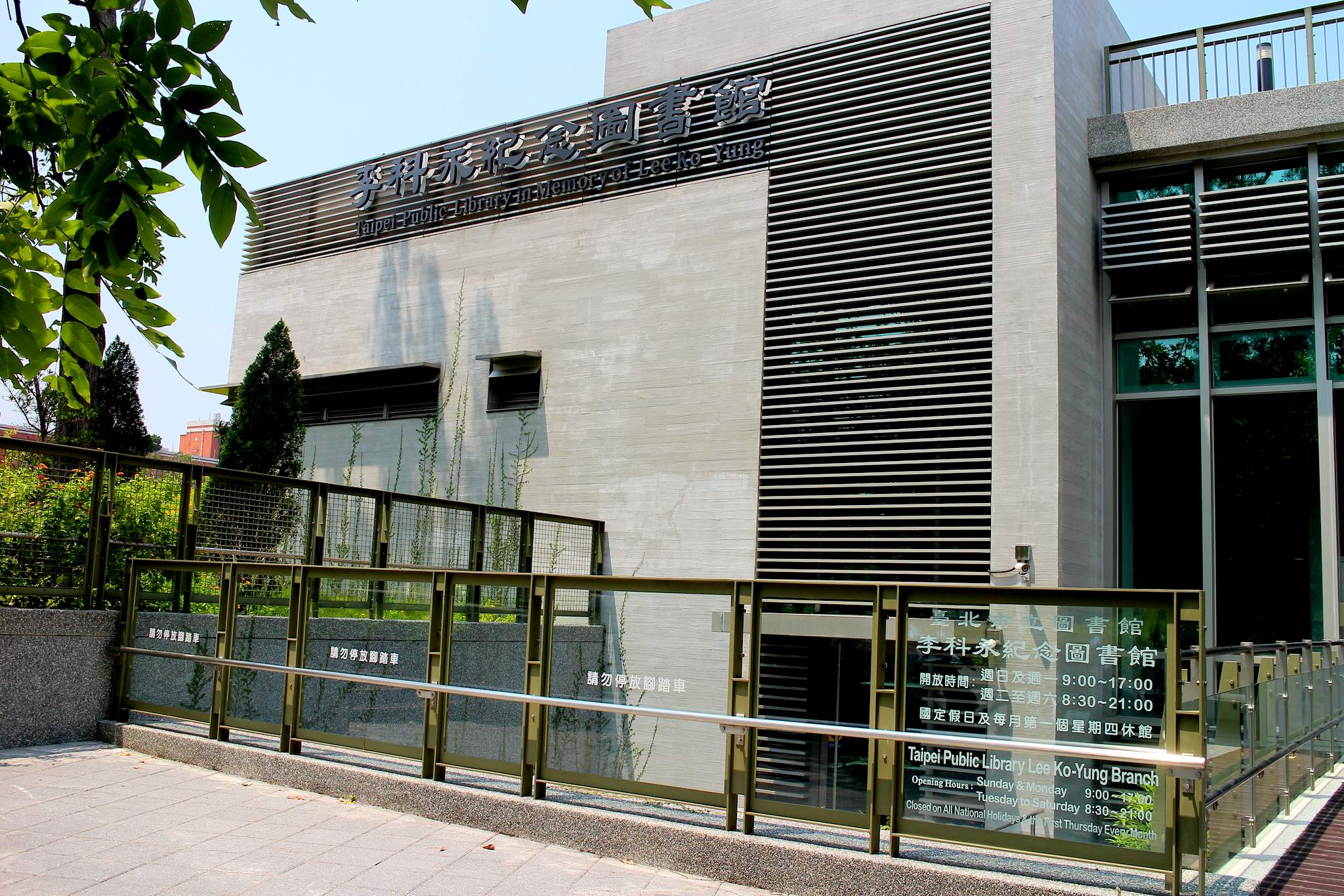 中文（台灣）: 臺北市立圖書館李科永紀念圖書館南側外觀。